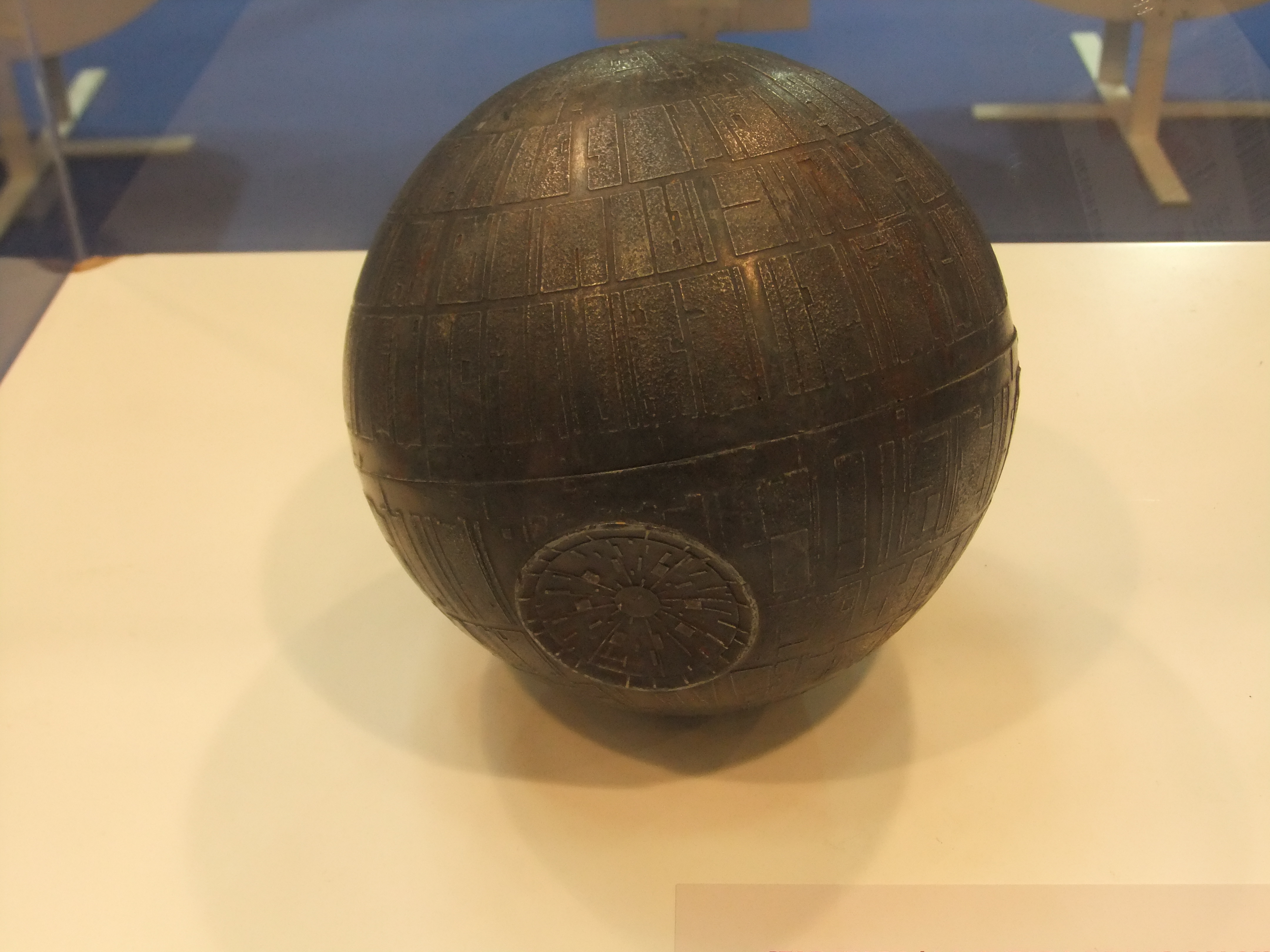 Maqueta de la Estrella de la Muerte usada durante el rodaje. Coleccion de Maite Minguez Ricart